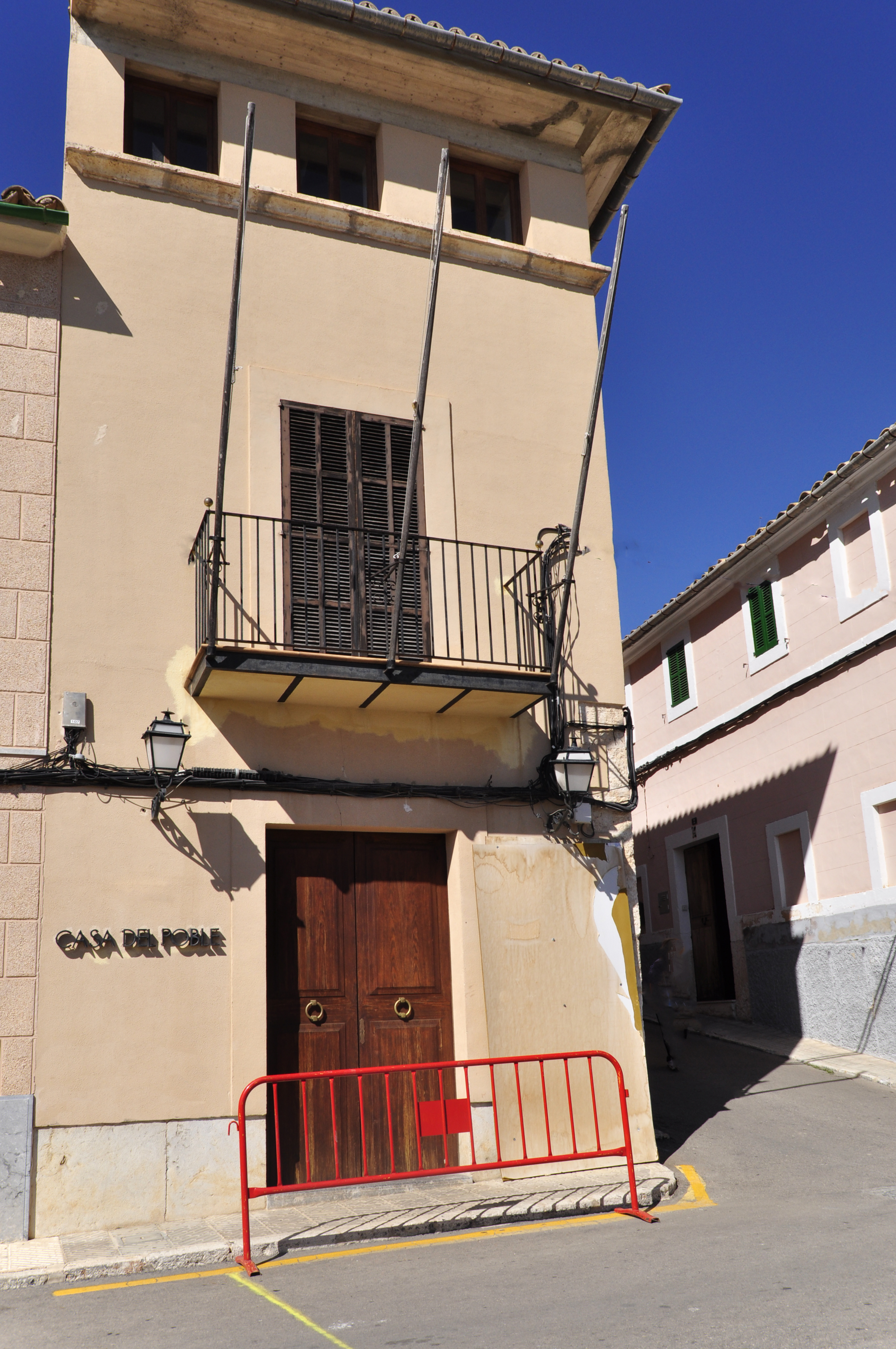 Caimari, Baleares, España casa del poble